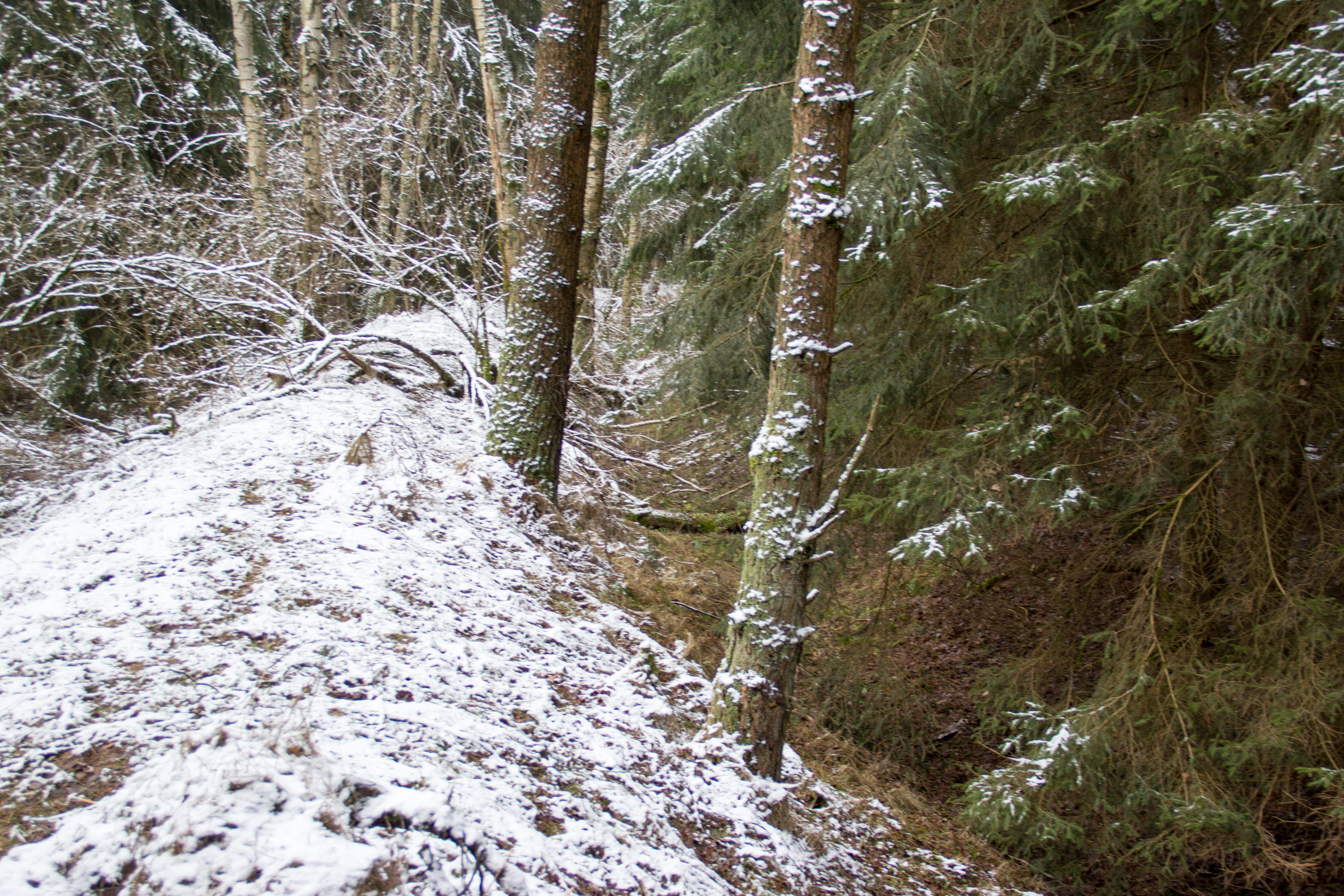 ehemalige Trümmerbahn Nürnberg, Fischbach, Nürnberg